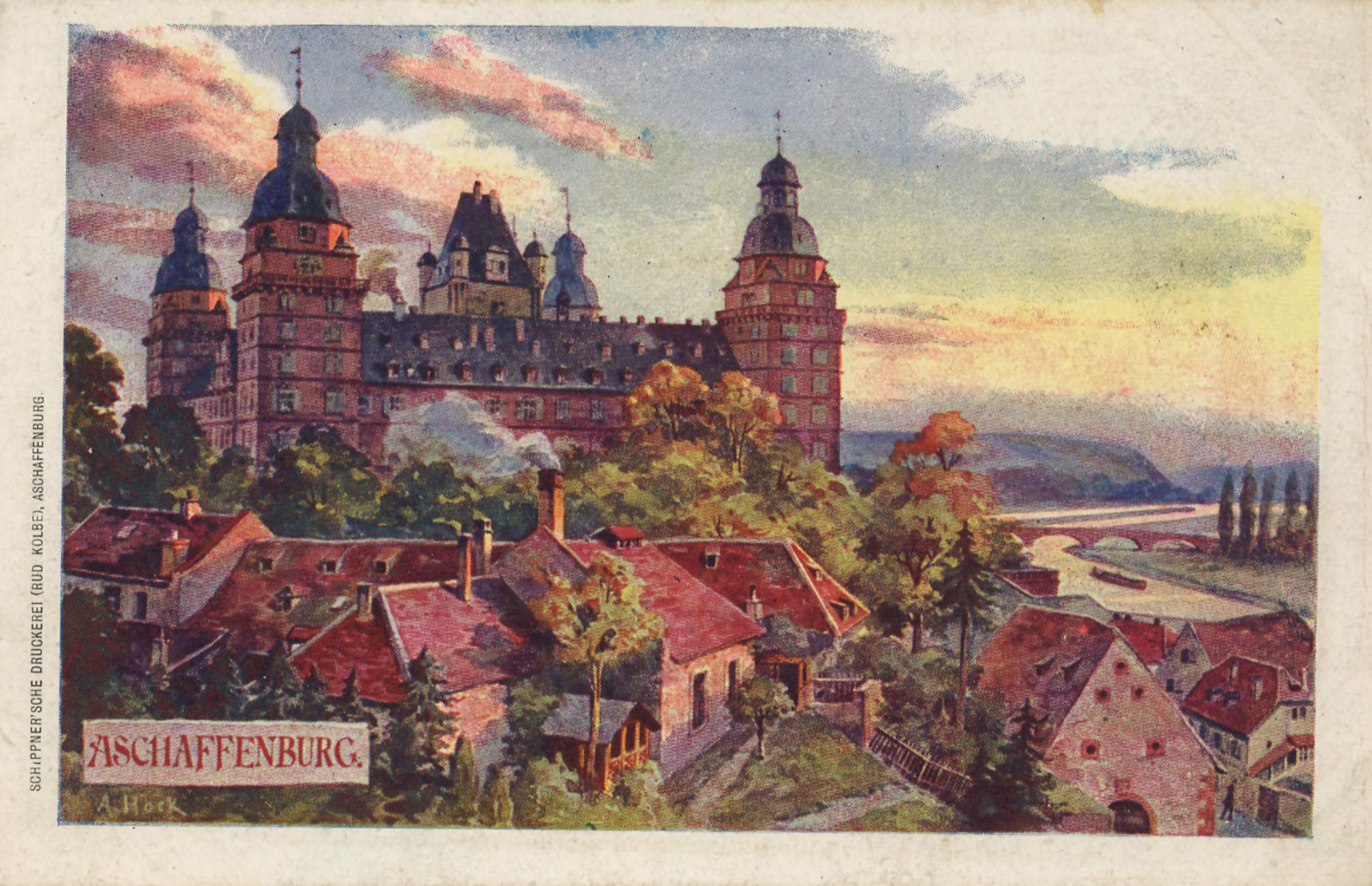 Burg